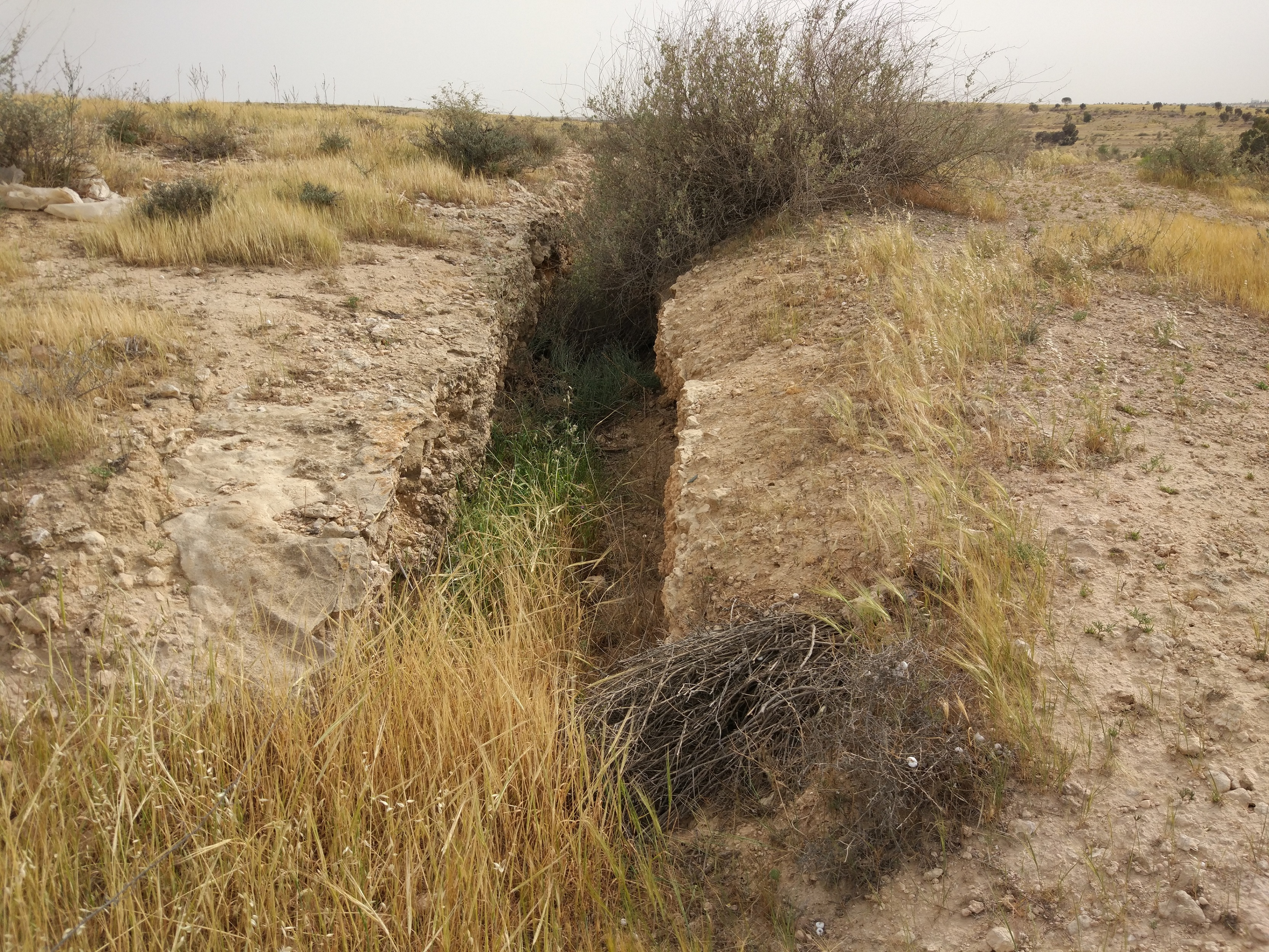 שרידי שוחות עות'מאניות ממלחמת העולם ה-1 ממערב לבאר שבע. השוחה נמצאת על גבעה כ-300 מטרים מדרום לנגב ZOO.